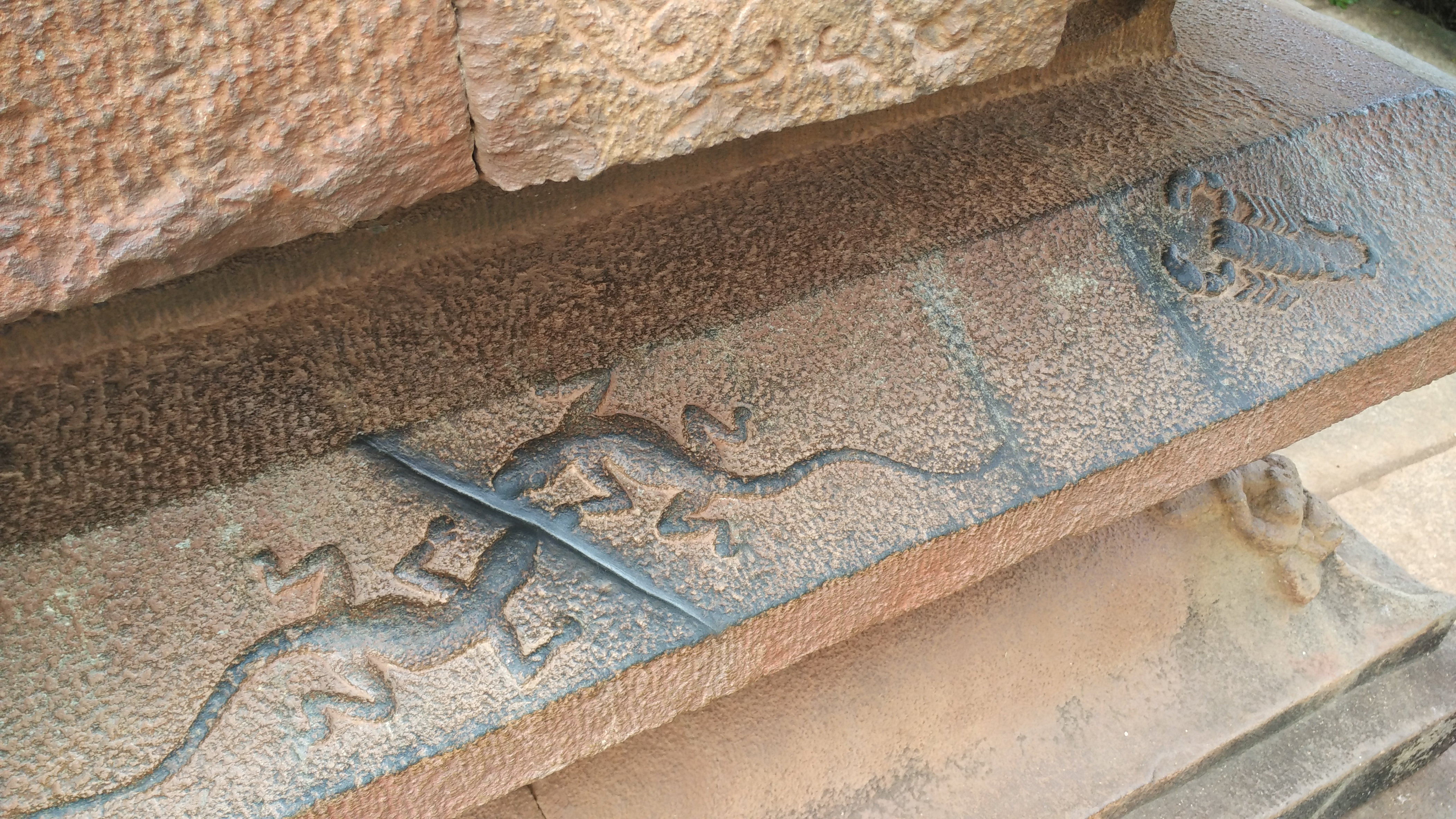 ಕನ್ನಡ: ಇಕ್ಕೇರಿಯ ಗುಡಿಯ ಗೋಡೆಯಲ್ಲಿ ಕೆತ್ತಿರುವ ಹಲ್ಲಿಗಳು.